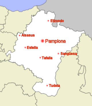 Mapa de las Comisarías de la Policía Foral en Navarra